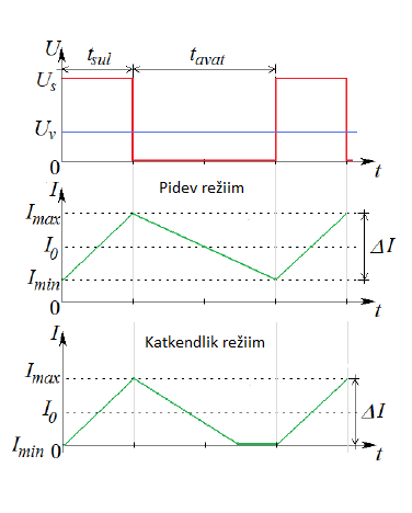 Pidev ja katkendlik režiim